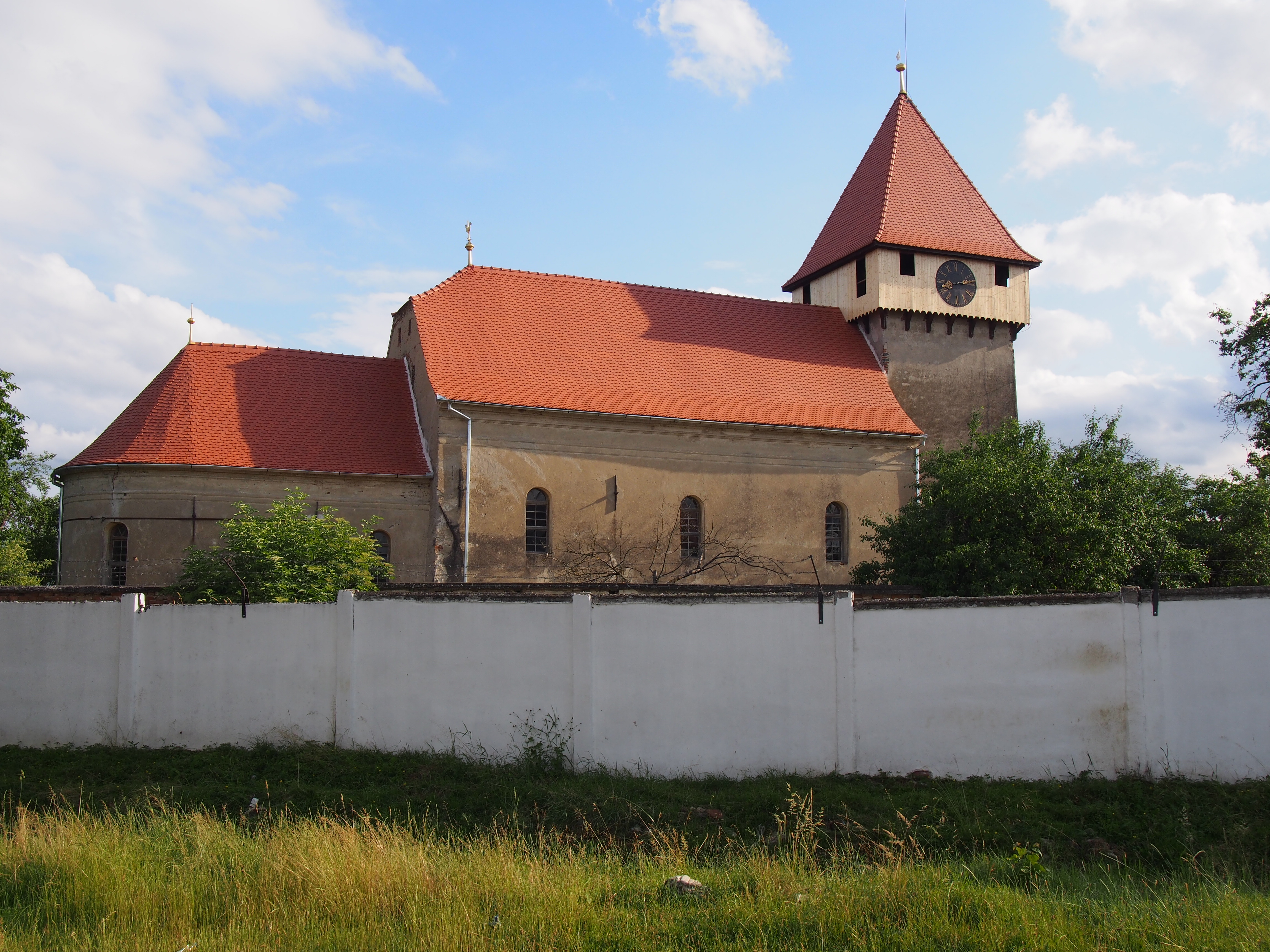 Die Kirche wurde 1633 gebaut und 2015 renoviert.